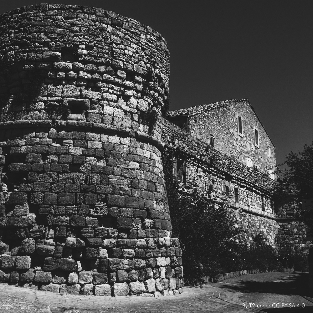 Remparts d'Assas en 2016, Hérault (34), France. Époque féodale (XIe siècle).